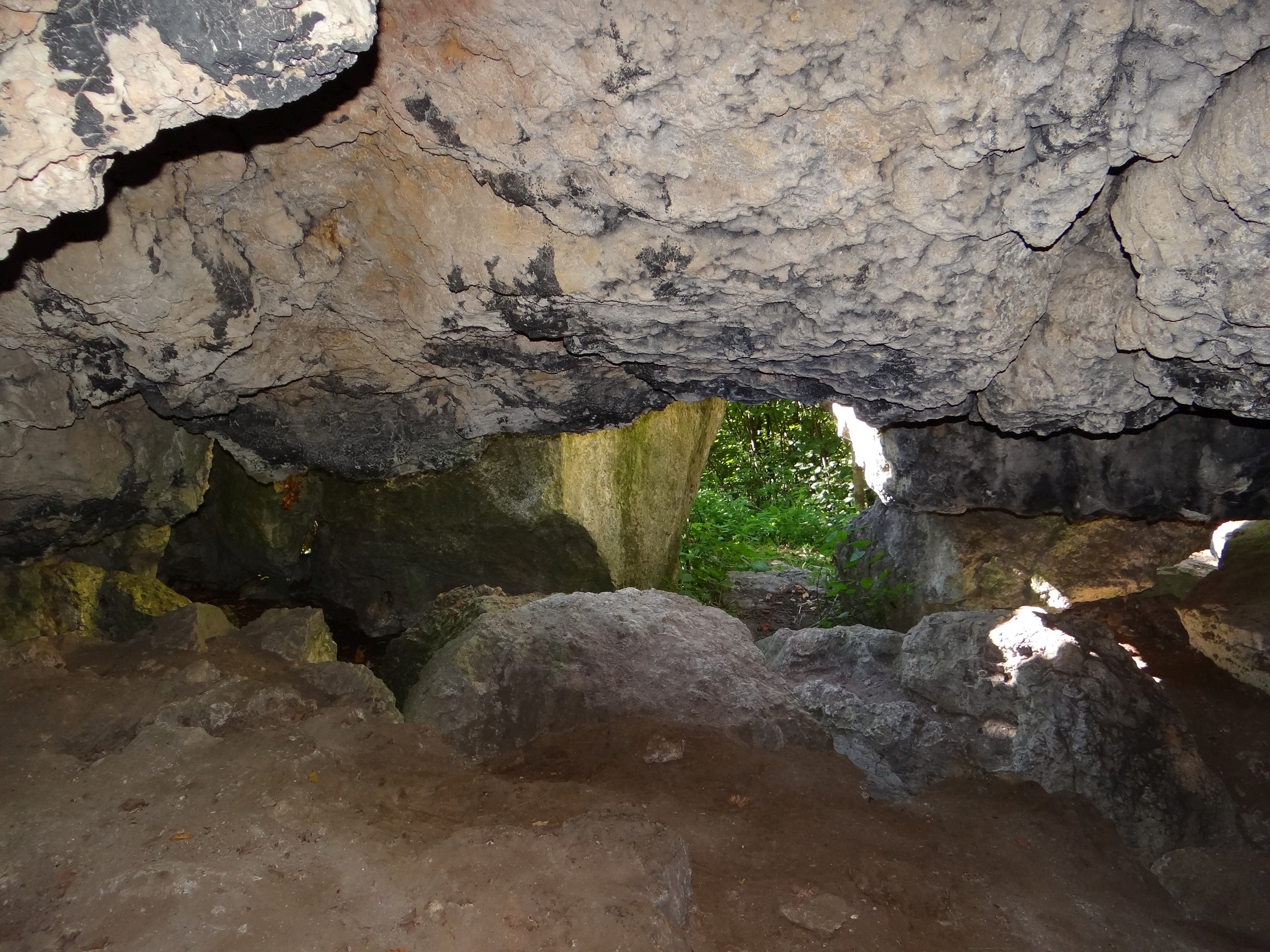 Jaskinia na Wrzosach Południowa